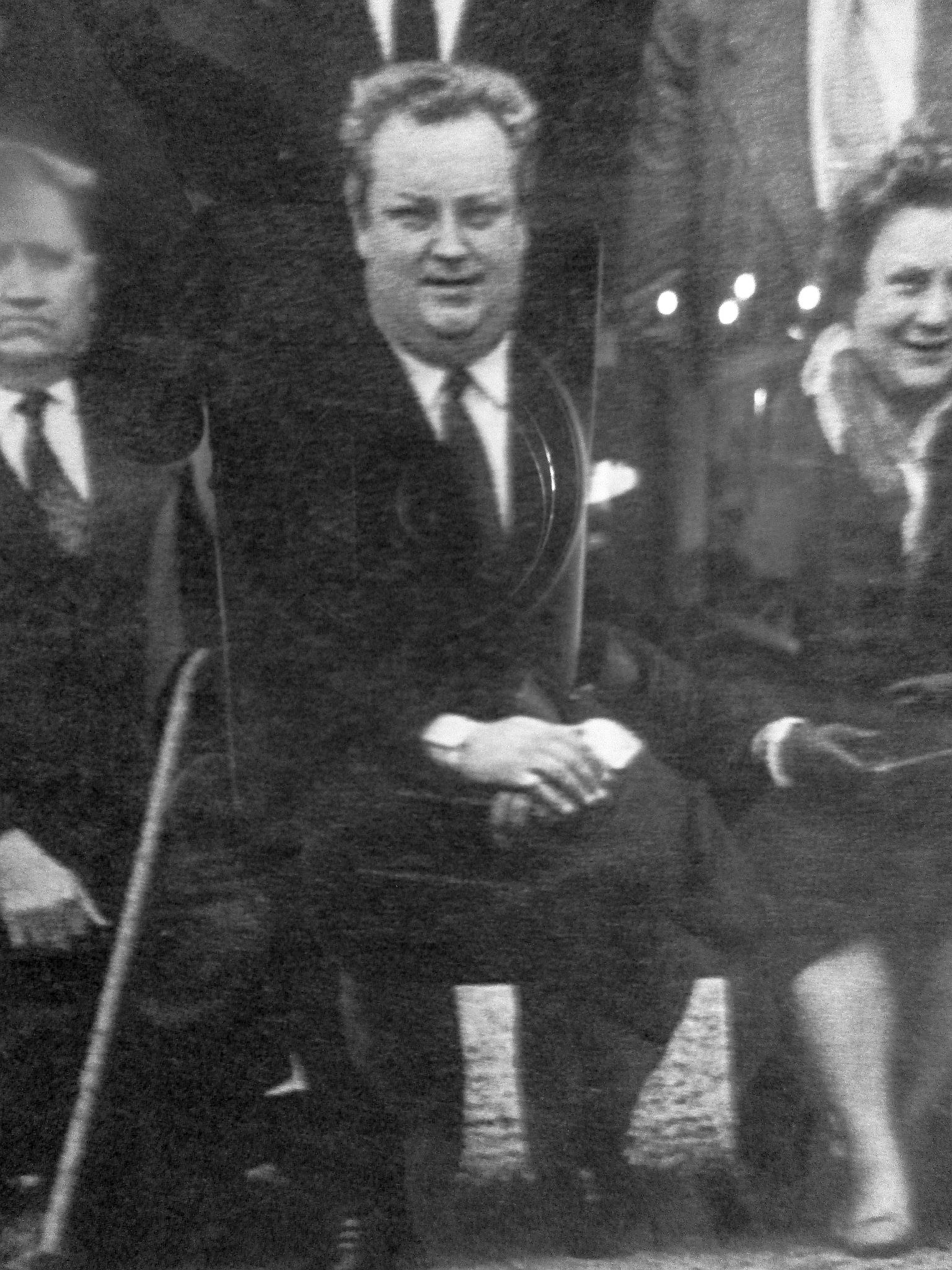 Roland Bugatti dans les années 1960